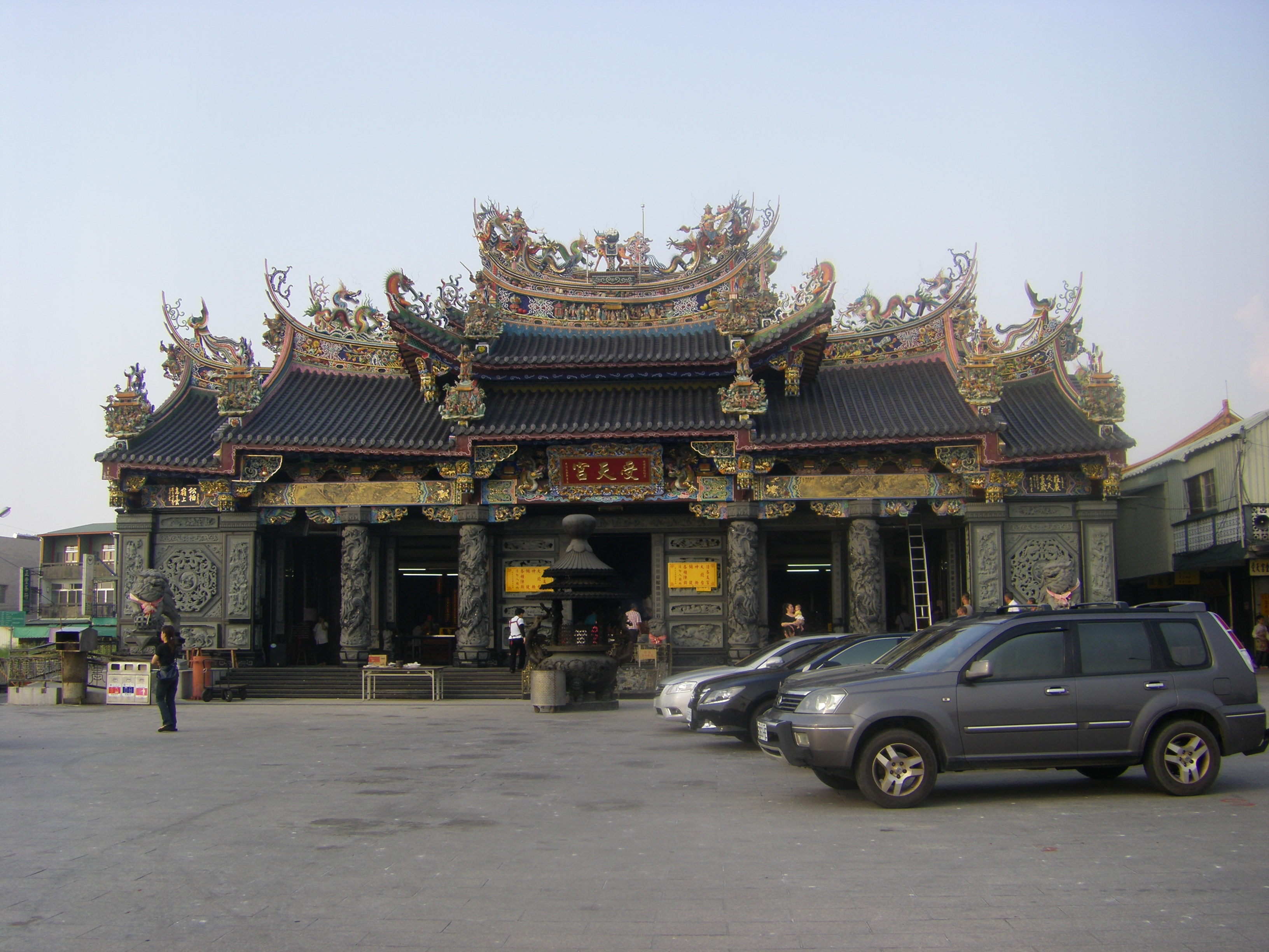 中文（台灣）: 松柏嶺受天宮